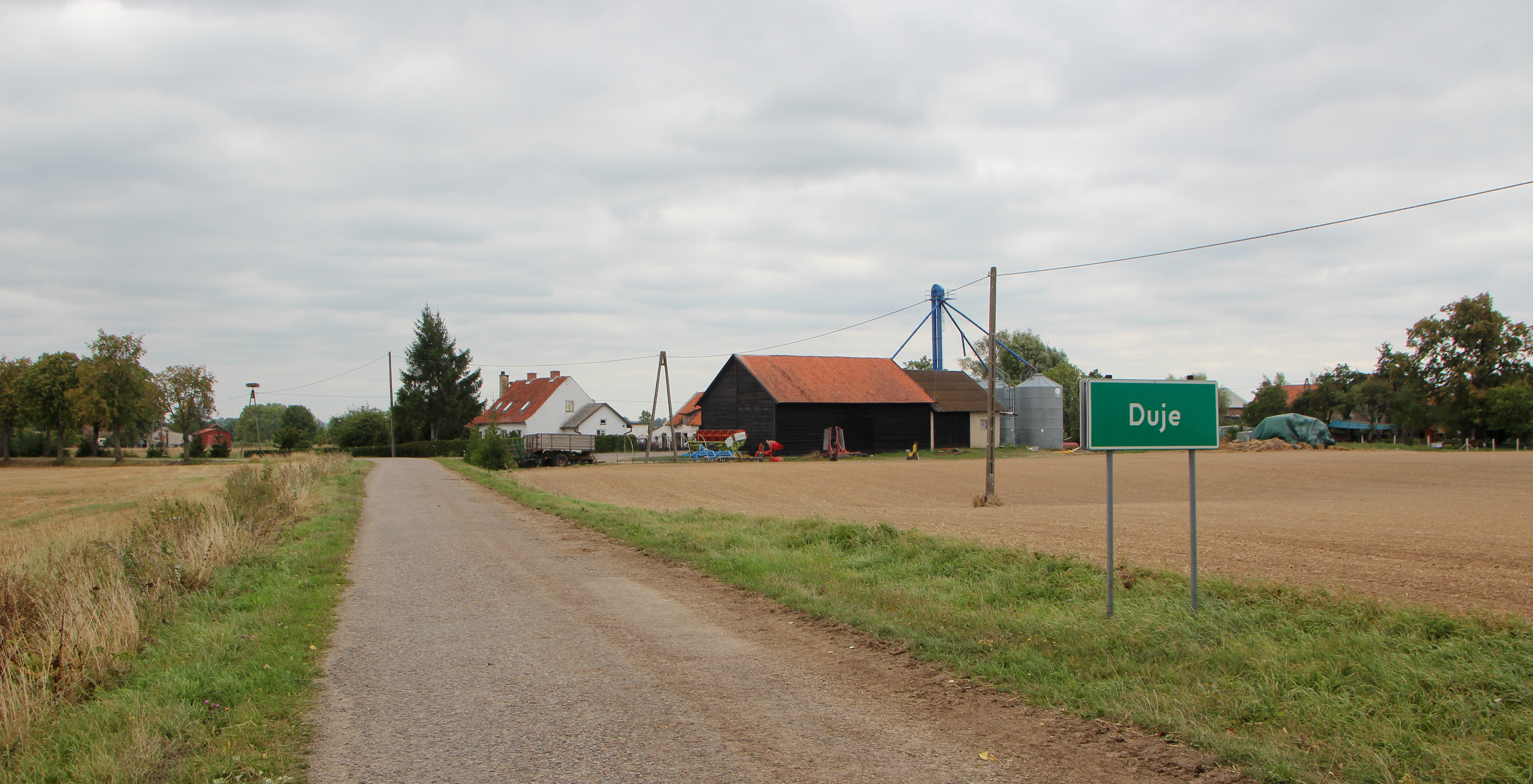 Duje - wieś w Polsce w województwie warmińsko-mazurskim, w powiecie kętrzyńskim, w gminie Barciany.